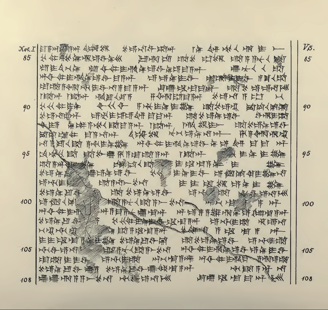 List Tuszratty do Amenhotepa III w języku huryckim – autografia.